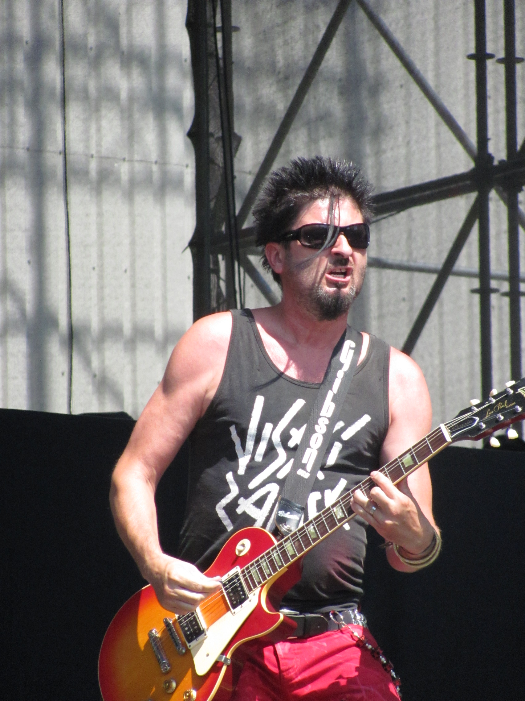 Michal Pixa, Visací zámek, Ronnie James Dio stage, Masters of Rock 2010